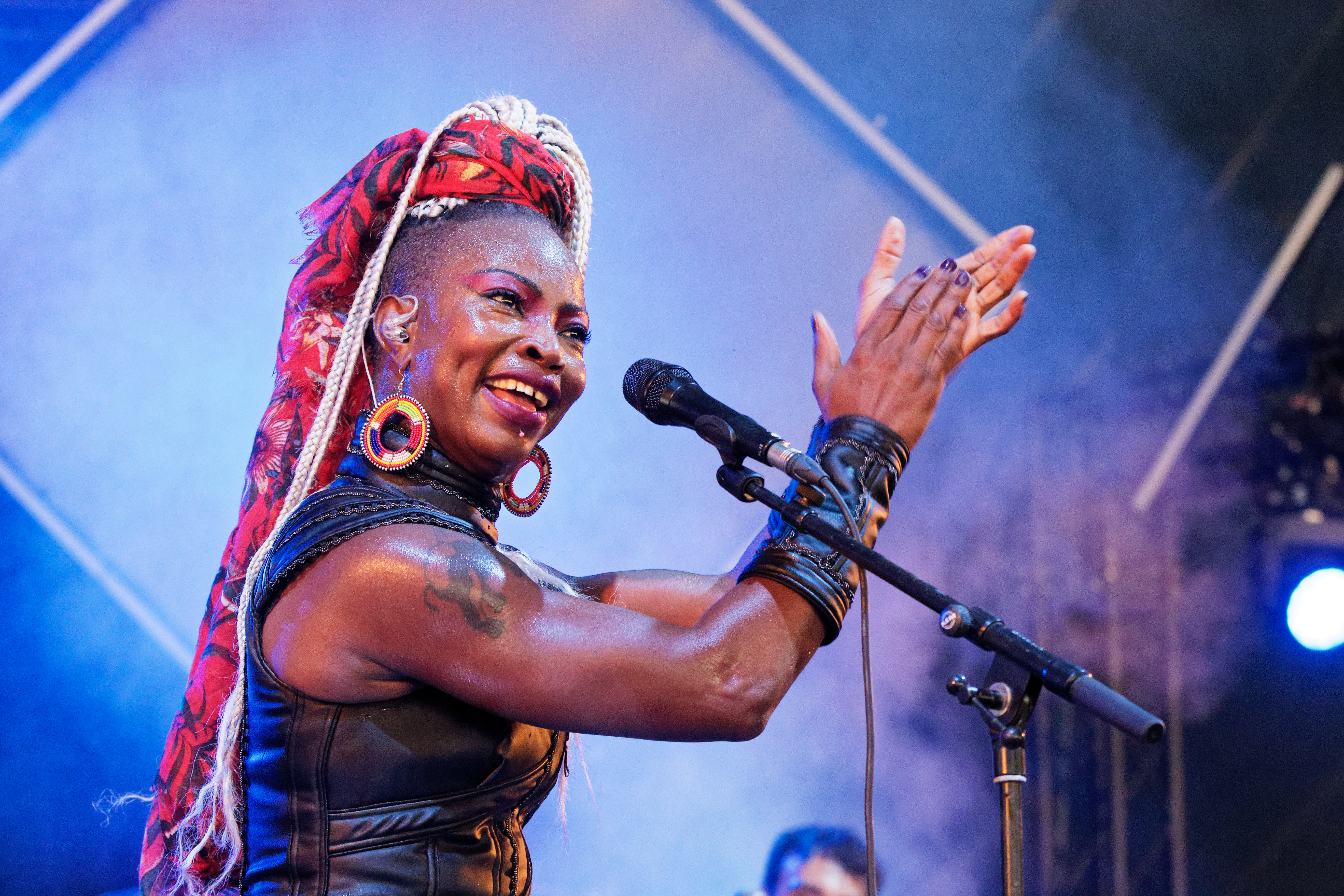 Dobet Gnahoré en concert sous le chapiteau de Seb lors du festival du Bout du Monde 2018 à Crozon dans le Finistère (France).